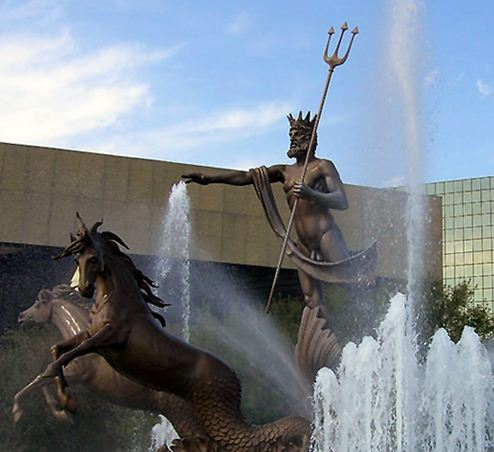 fuente en la Macroplaza